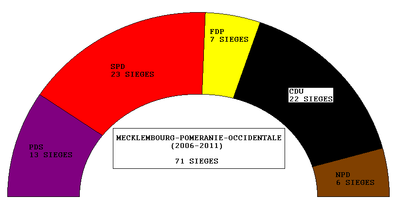 Elus de Elus de Mecklembourg-Poméranie-Occidentale entre 2006 et 2011 lors des élections locales en Elus de Mecklembourg-Poméranie-Occidentale de 2006.